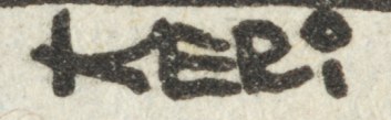 Keri-Signatur (Kellner/Rieder) unter einem Columbus-Comicstrip in der Neuen Kronen Zeitung